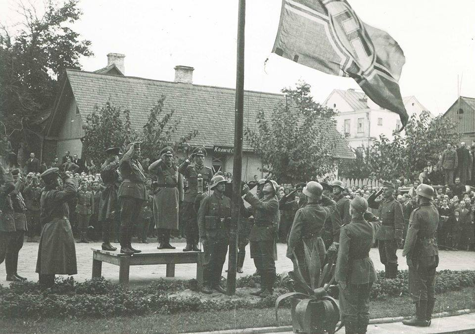 Беларуская (тарашкевіца): Берасьце (Bieraście), праспэкт Бульварны (praspekt Bulvarny). Супольны нацысцка-савецкі вайсковы парад